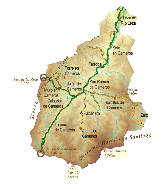 Mapa Físico Comarca Camero Viejo